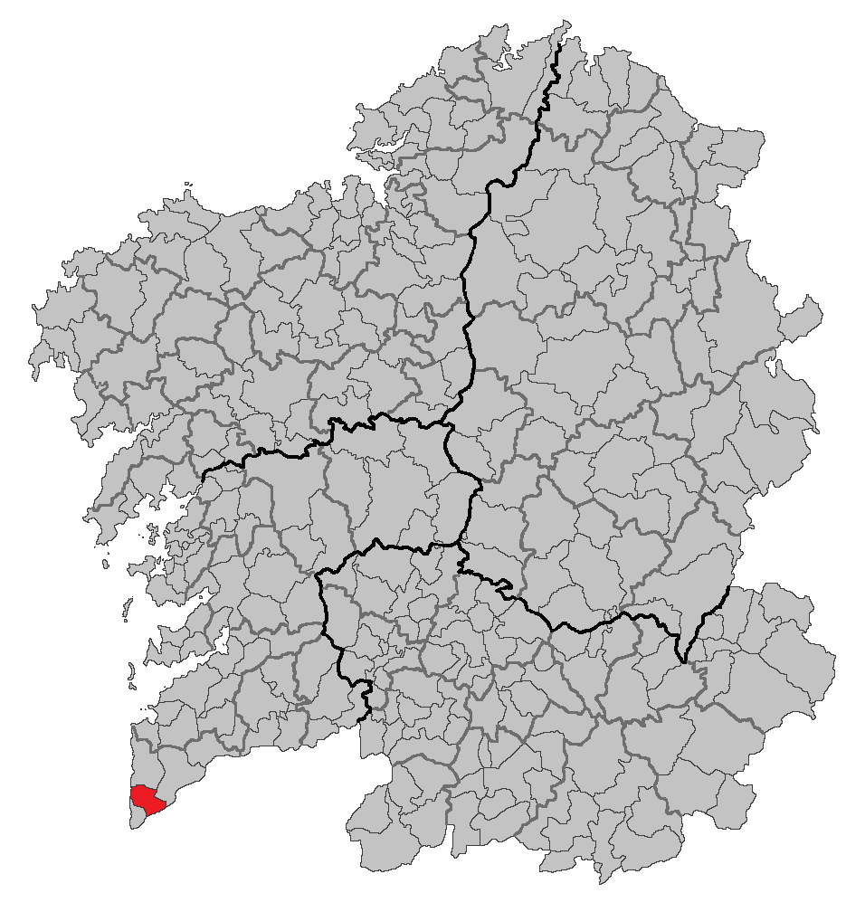 Mapa coa localización do concello de O Rosal.